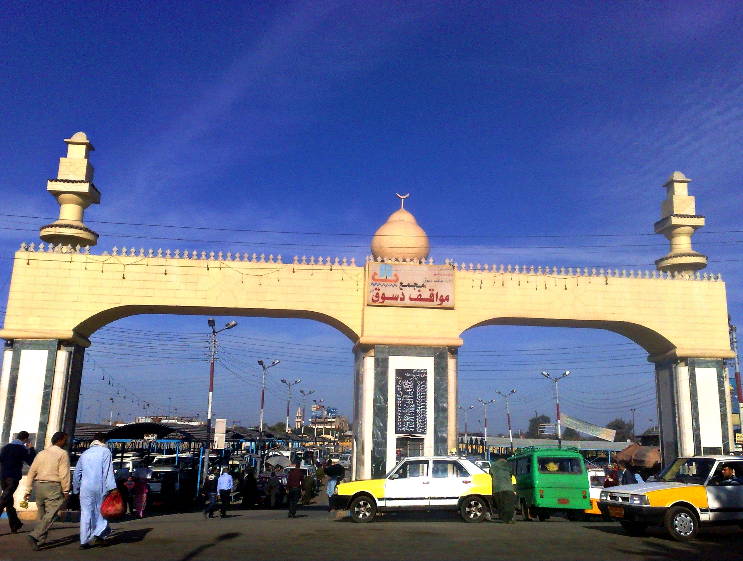 مجمع مواقف دسوق للمدن